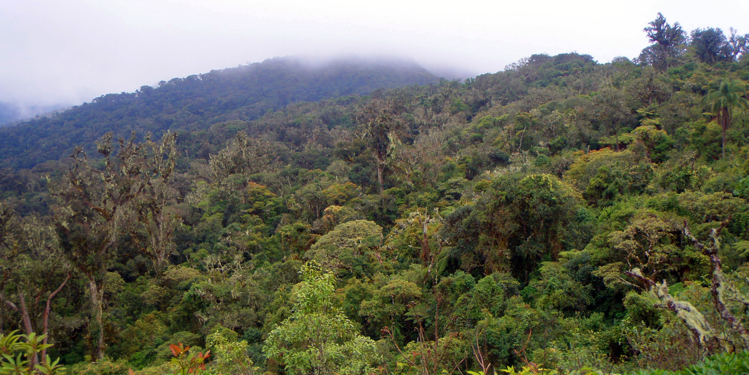 parque nacional Amboró, ubicado en el departamento boliviano de Santa Cruz.